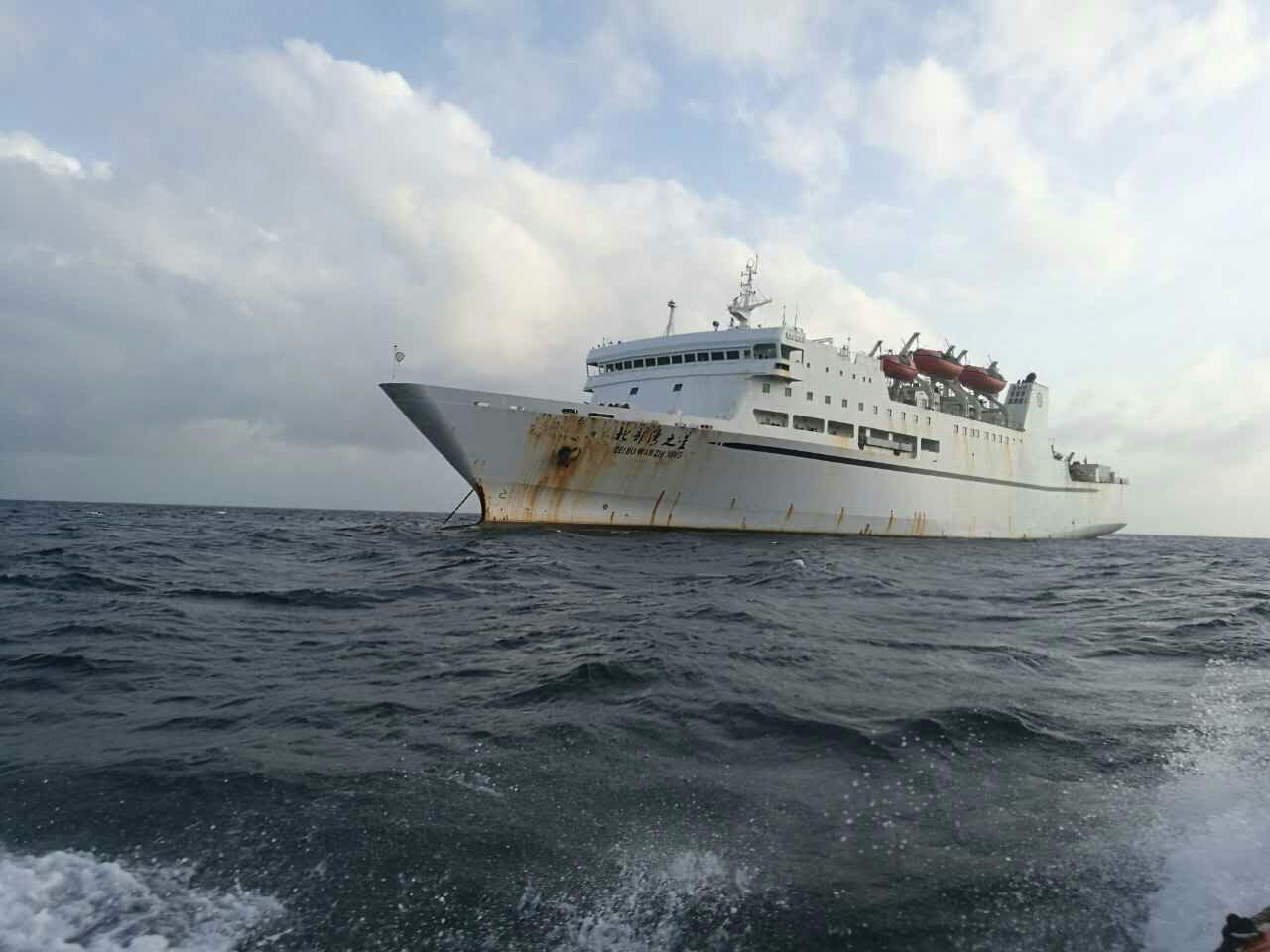 北部湾号邮轮